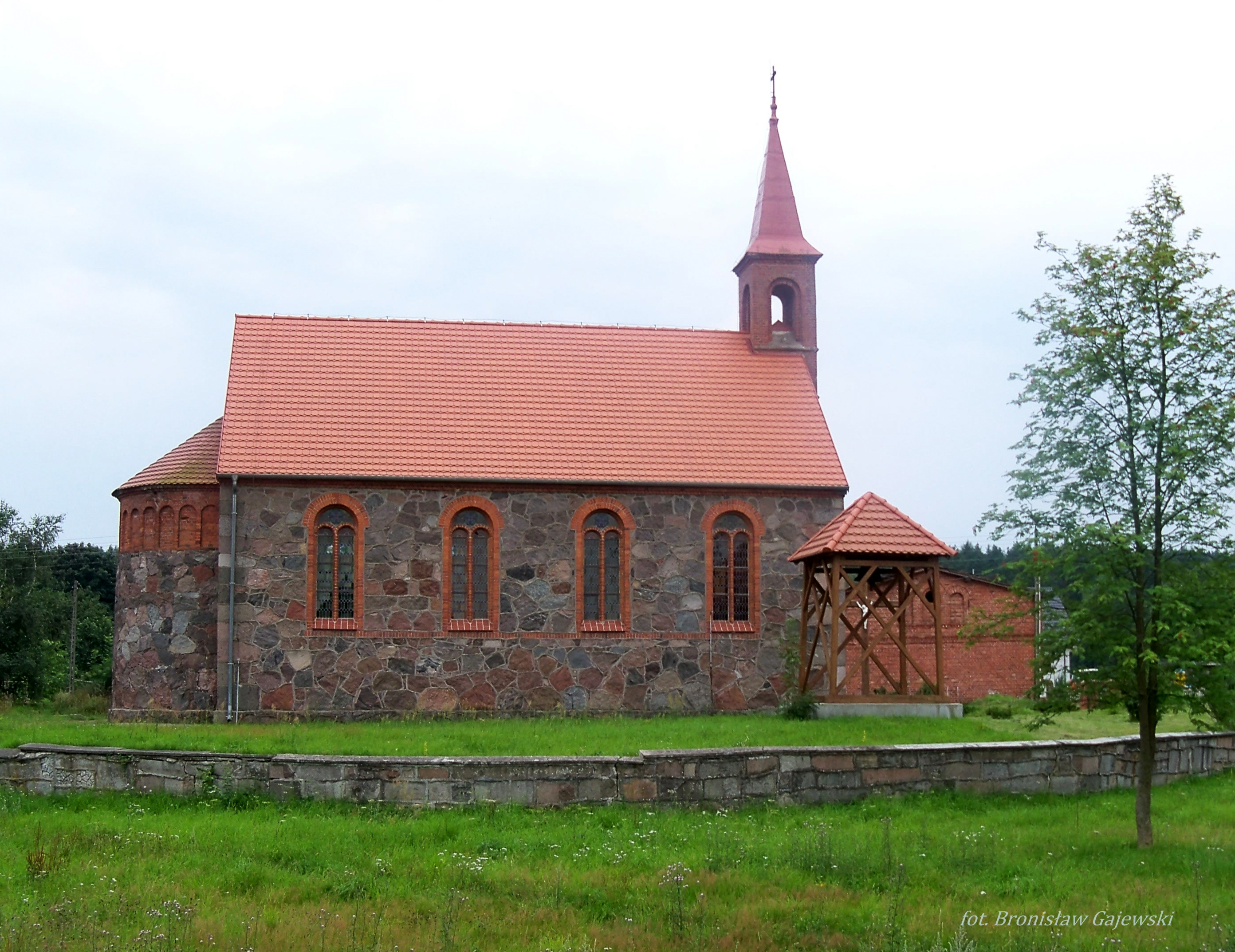 Cieszeniewo - rzymskokatolicki kościół parafialny pw. Najświętszego Serca Pana Jezusa, neoromański, bud. 1859, kamienno-ceglany